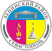 Емблема Ленінського району